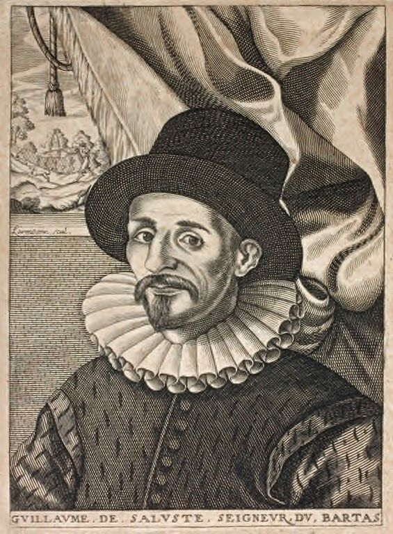 Runa Simi: occitan simipa quellkaq